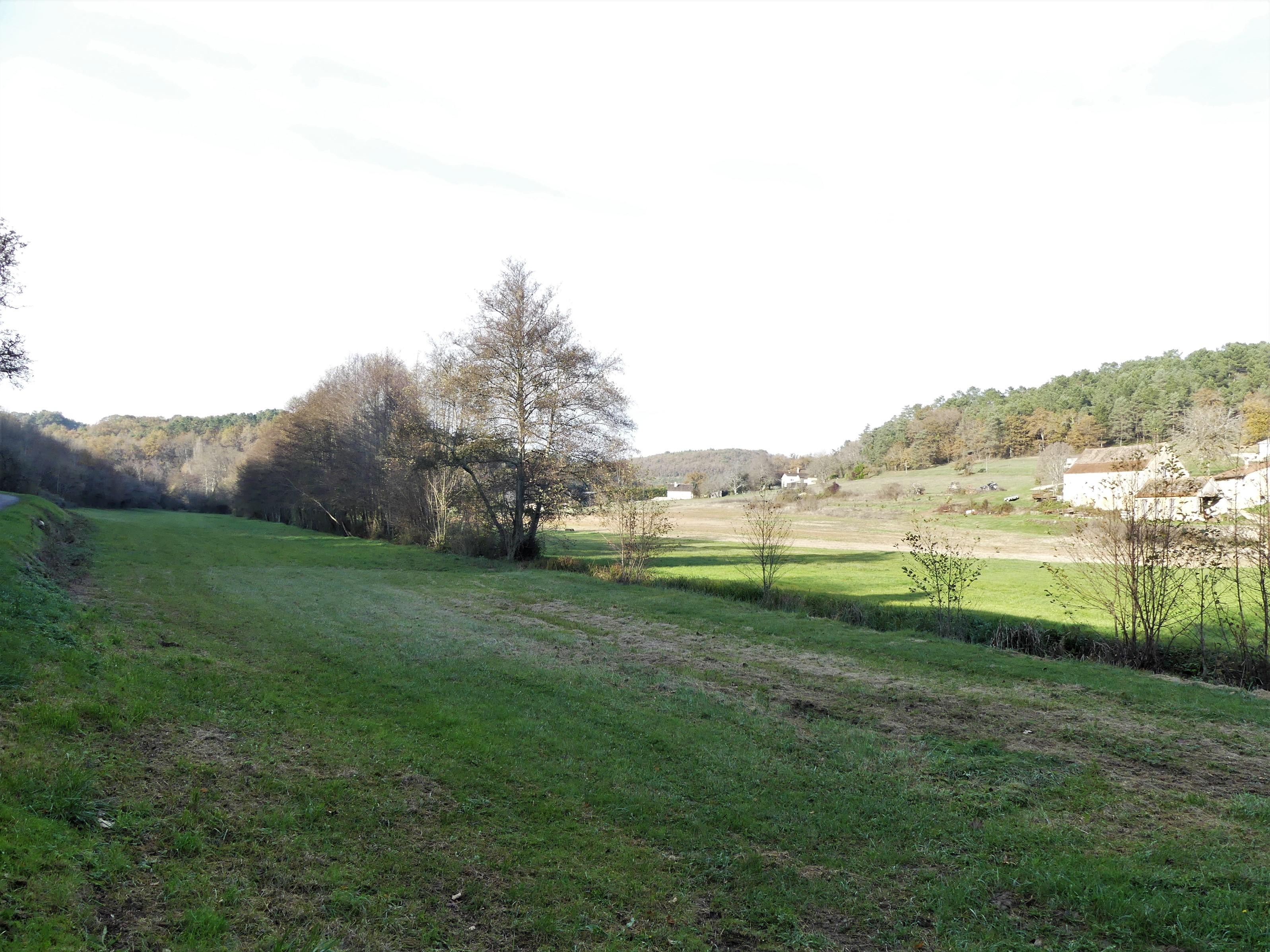 La vallée du Galinat au nord du lieu-dit la Roque, Saint-Julien-de-Crempse, Dordogne, France. Le Galinat coule au niveau du rideau d'arbres. Vue prise en direction de l'amont.